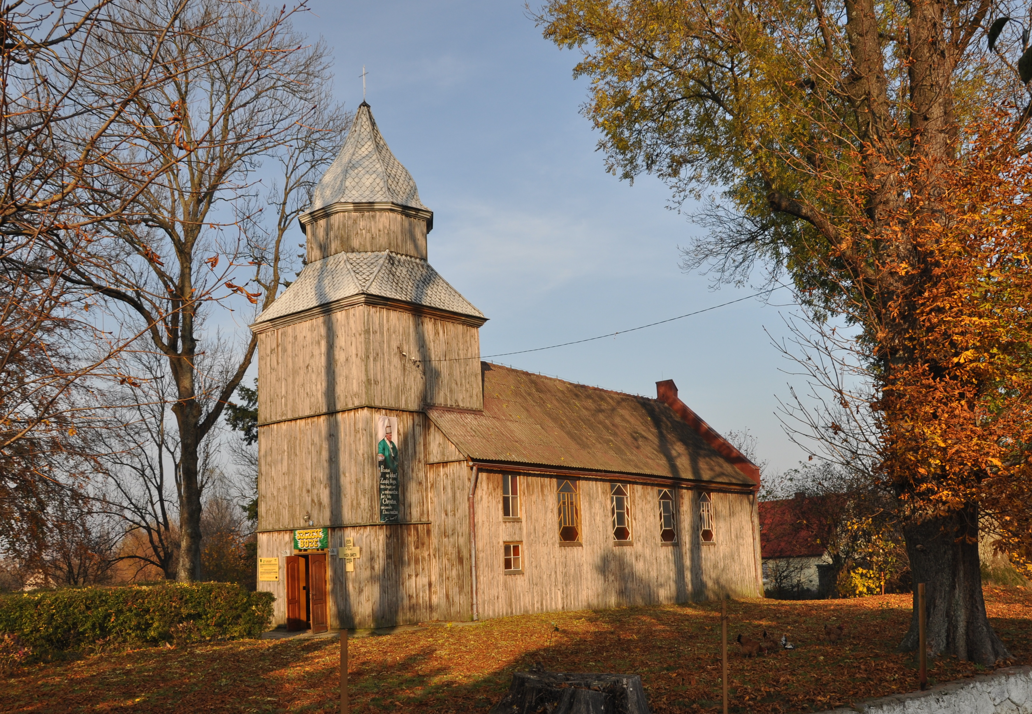 Kościół w Dębicy (gmina Rymań) – ujęcie od południowego zachodu